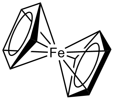 Di(η5-cyclopentadienyl)eisen(0) (Ferrocen), seitliche Perspektive